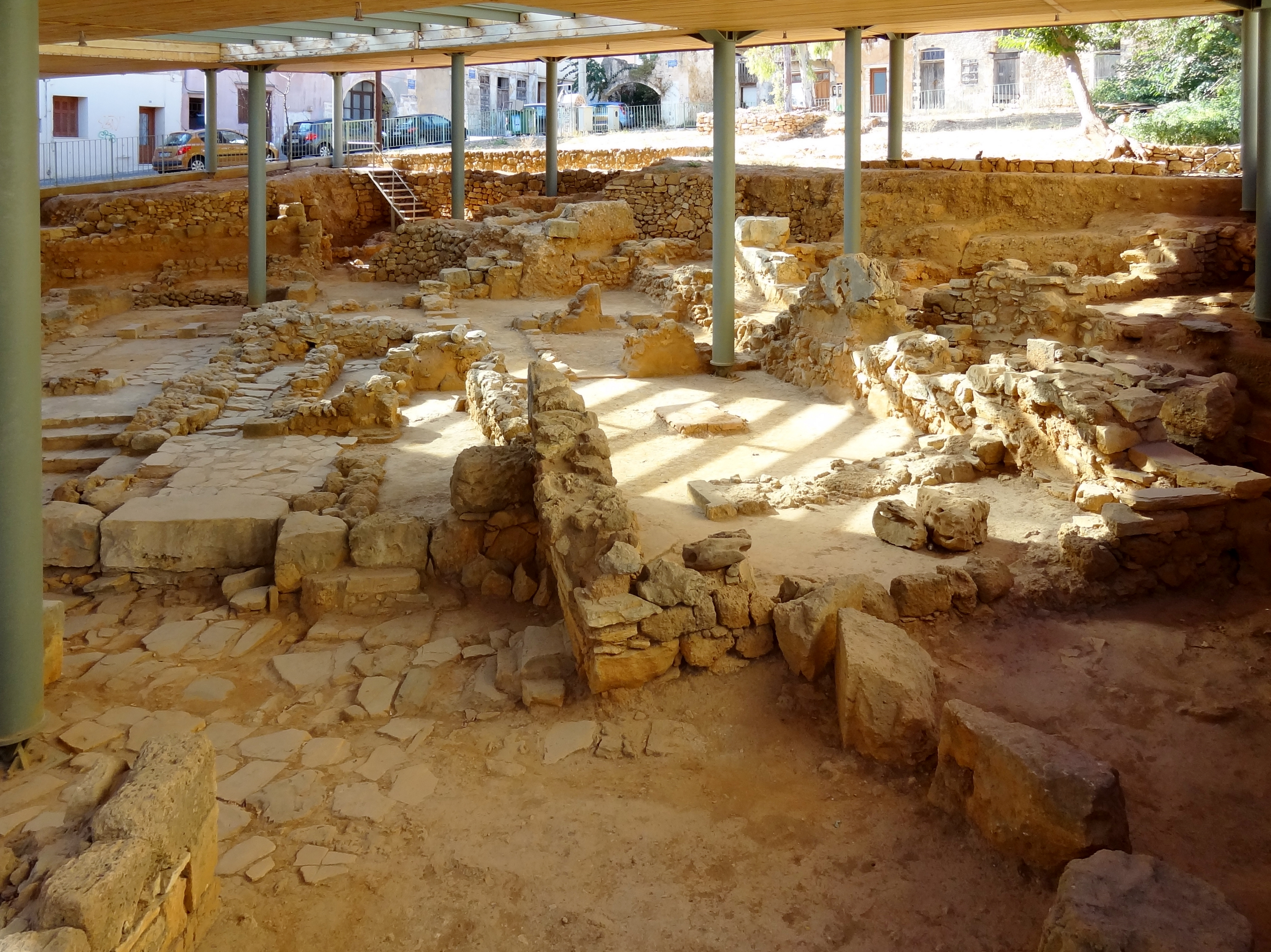 Minoische Ausgrabungen auf dem Kastelli-Hügel in Chania, Gemeinde Chania, Regionalbezirk Chania, Kreta, Griechenland